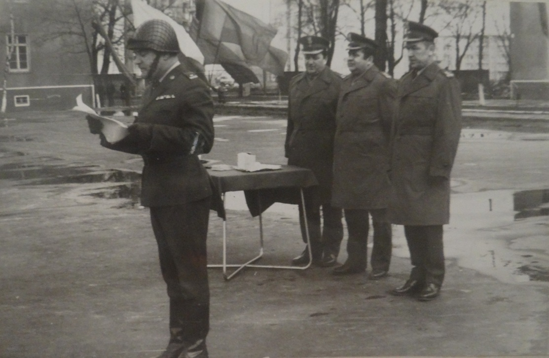 Garnizon Stargard Szczeciński, 1973r. Czyta rozkaz szef sztabu 45 bm mjr Wacław Krzysztofik